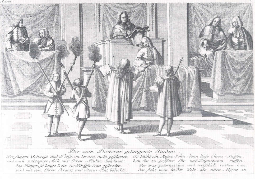 Copper engraving of Johann Georg Puschner (alias "Dendrono") of 1725: "The student achieving the doctor's degree", Altdorf University (Germany) "Dendrono" (Johann Georg Puschner), "Der zum Doctorat gelangende Student", Kupferstich von 1725, Szenen aus dem Leben der Studenten an der Universität Altdorf: Der zum Doctorat gelangende Student Wer sauern Schweiß und Fleiß im lernen nicht geschonet, wird nach vollzogner Müh mit Ehren=Ruhm belohnet: das Haupt so lange Zeit die Kräffte dran gestreckt, wird mit dem Ehren-Krantz und Doctor-Hut bedeckt. So blüht ein Musen Sohn denn diese Ehren-Stuffen, kan ihn zu größrer Ehr und Dignitaeten ruffen. Wer was gelernet hat und weißlich rathen kan, den sieht man in der Welt, als einen Abgott an.